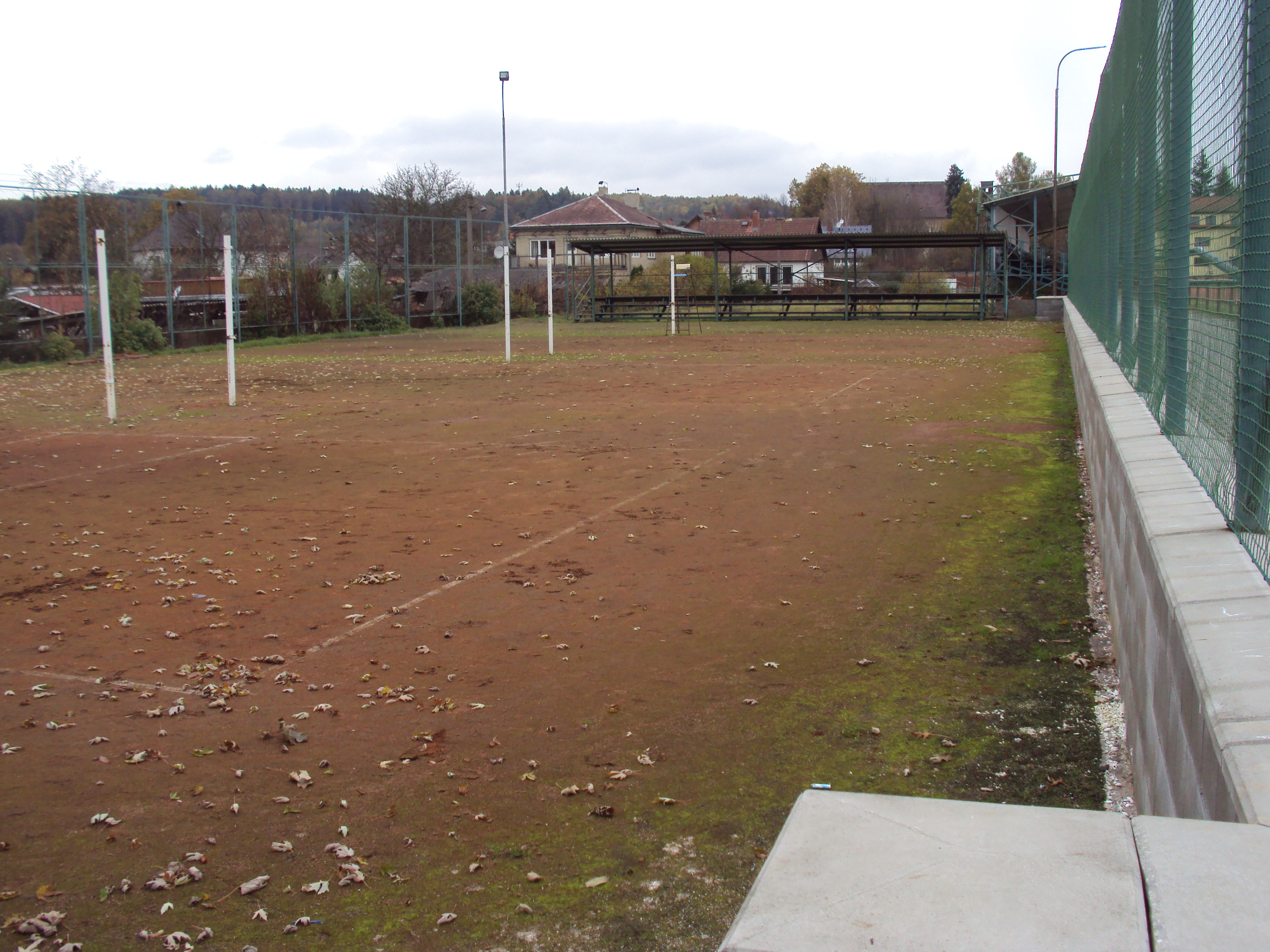 Volejbalová hřiště TJ Zákupy poblíž školy